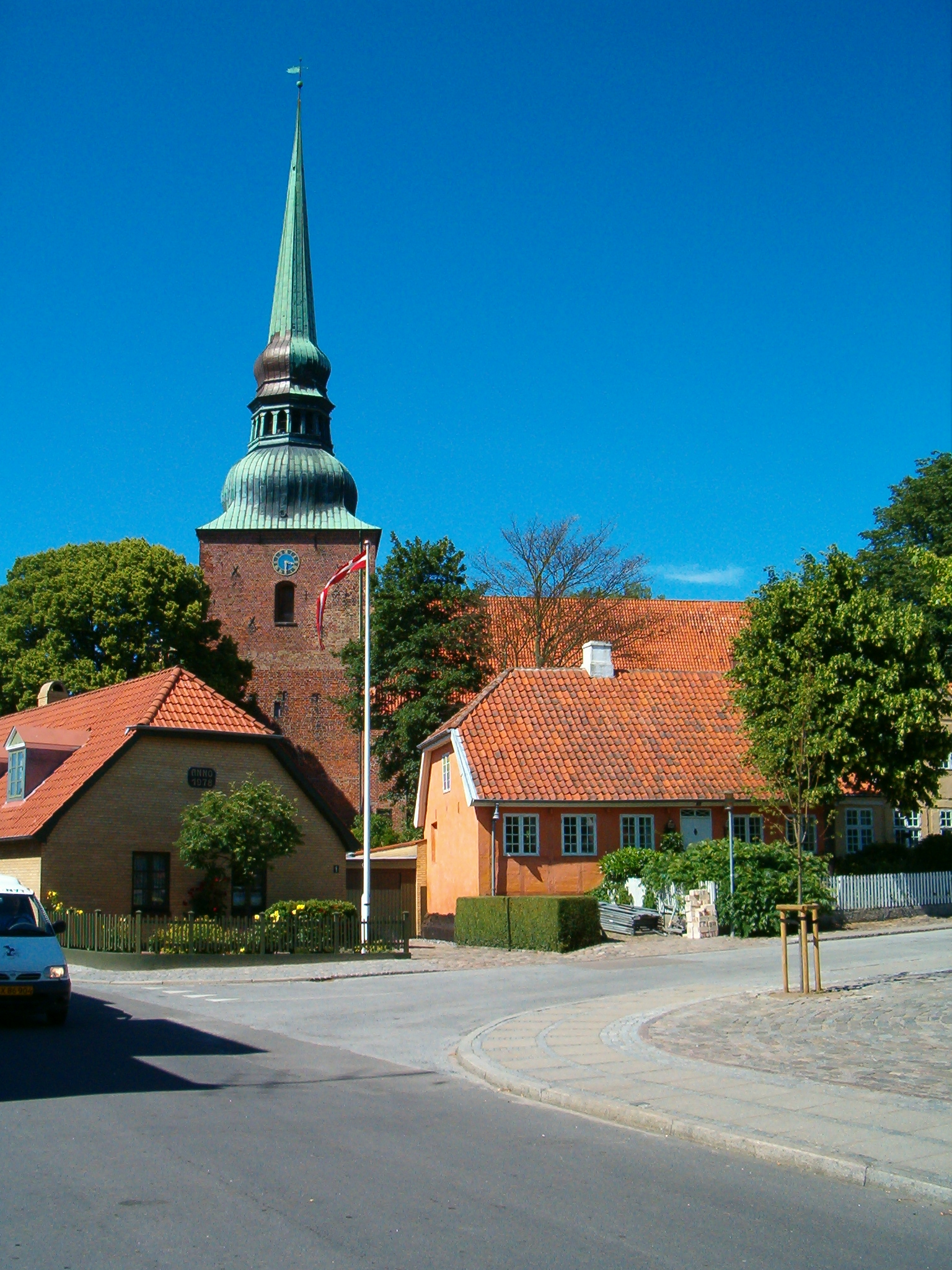 Nysted Kirke i Nysted på Lolland i Danmark Church of Nysted (Lolland/Denmark)